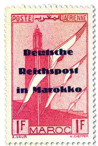 Britische Propagandafälschung für Deutschland. Gefälschte Aufdrucke auf Marken von Französisch-Marokko, um eine angeblich bevorstehende deutsche Besetzung von Marokko anzukündigen.